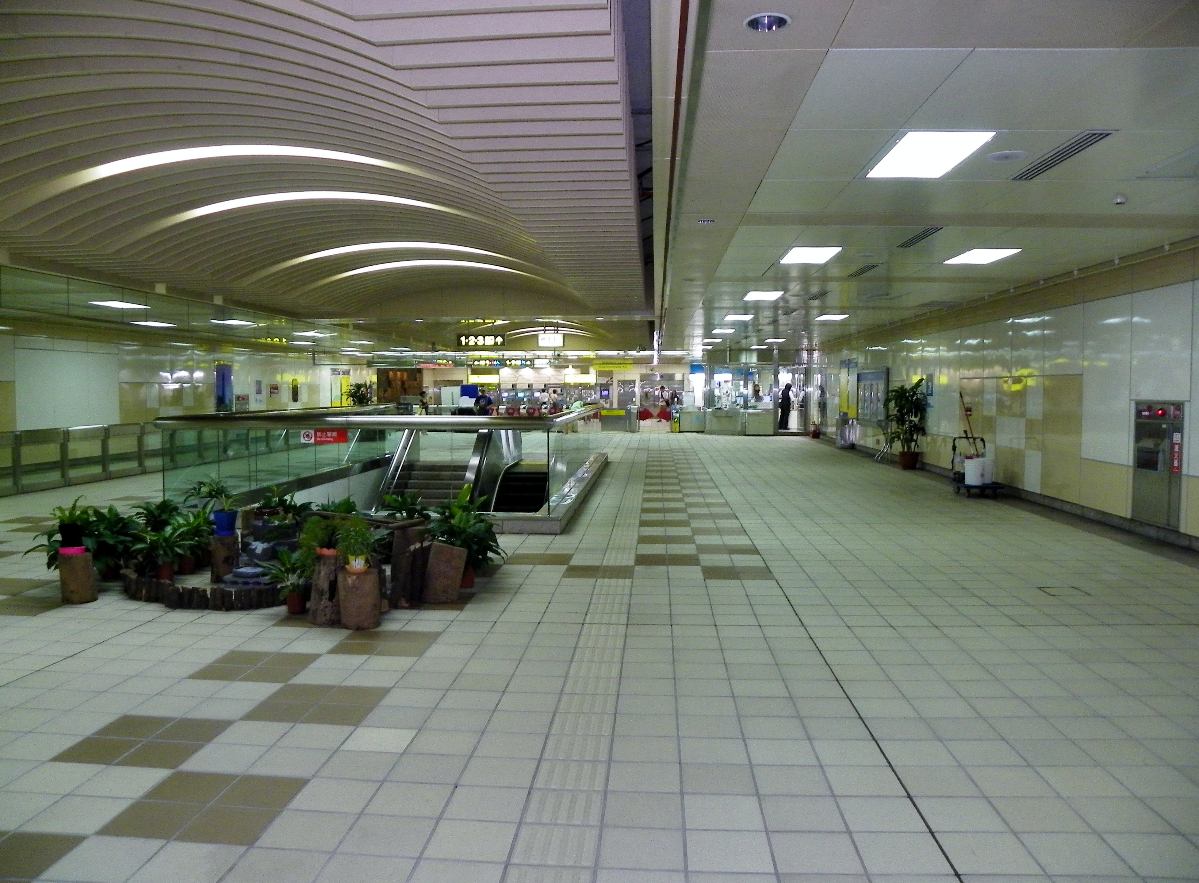 台北捷運土城線土城駅コンコース。